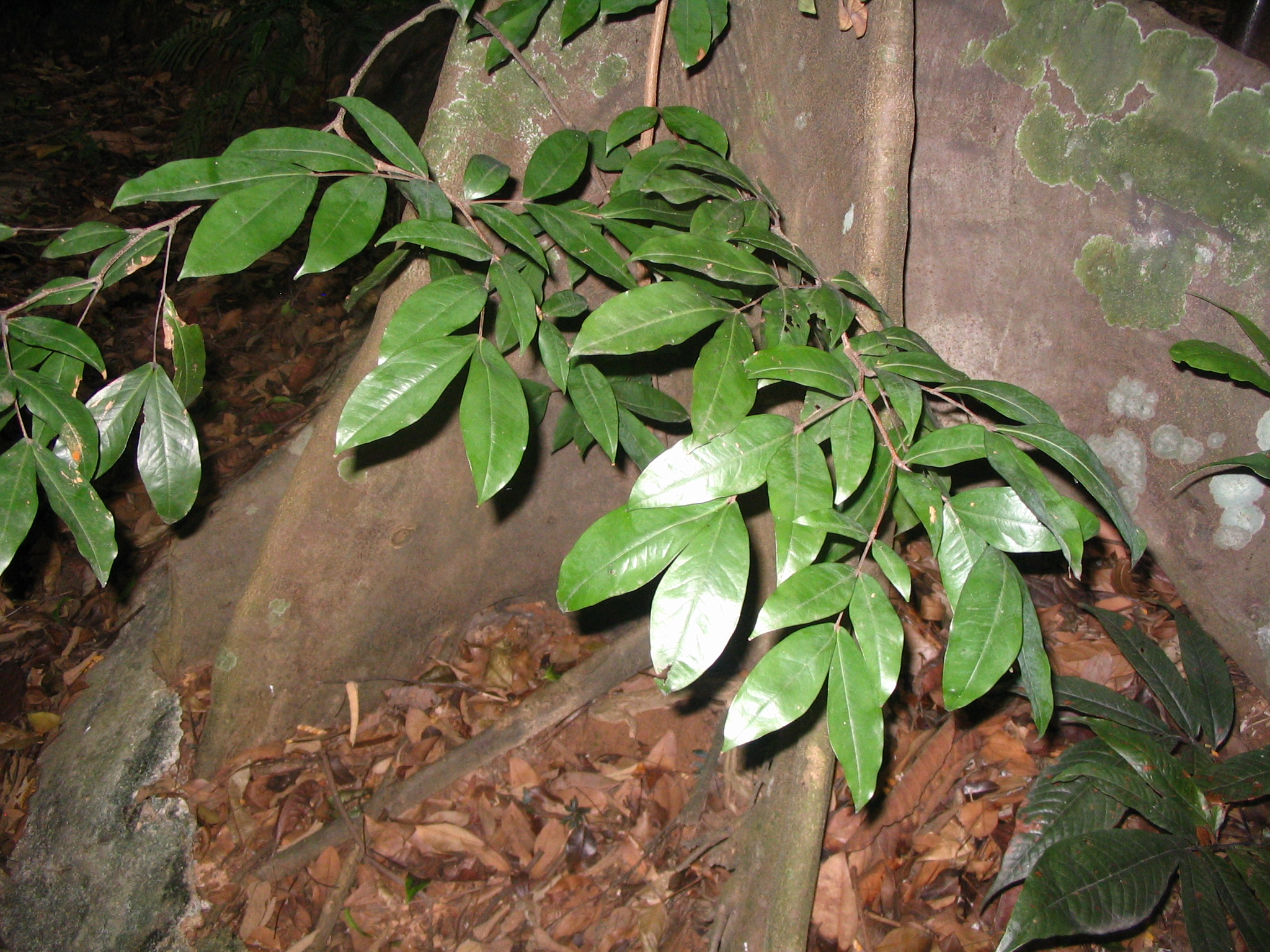 Cynometra malaccencis: détail des feuilles - Bukit Nanas Forest Reserve - Kuala Lumpur - Malaisie